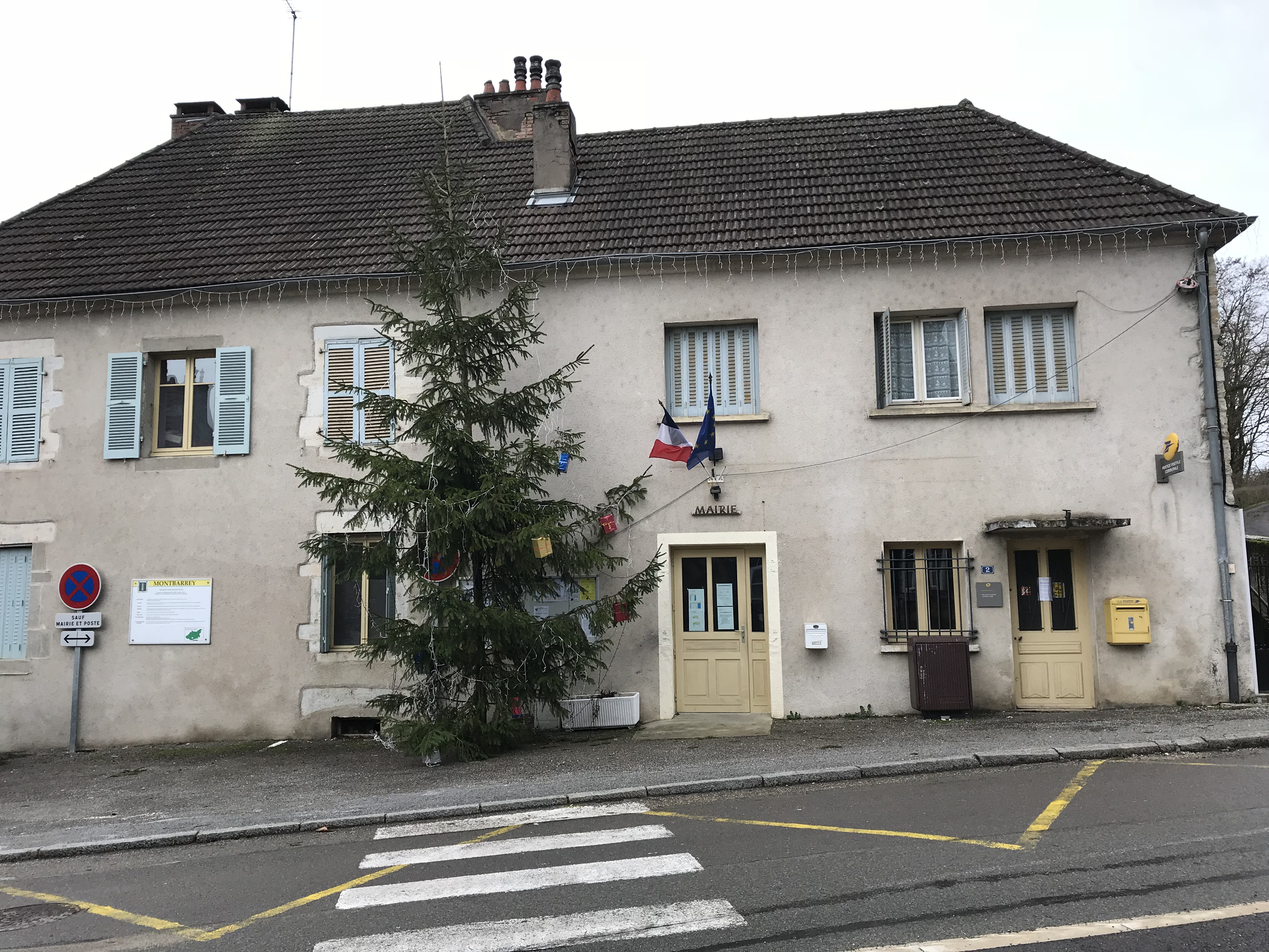 Image de Montbarrey (Jura) en janvier 2018.